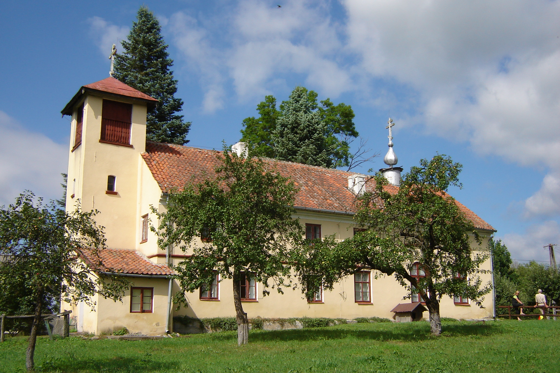 Wojnowo (vor 1945 Eckertsdorf), Kirche der Altgläubigen